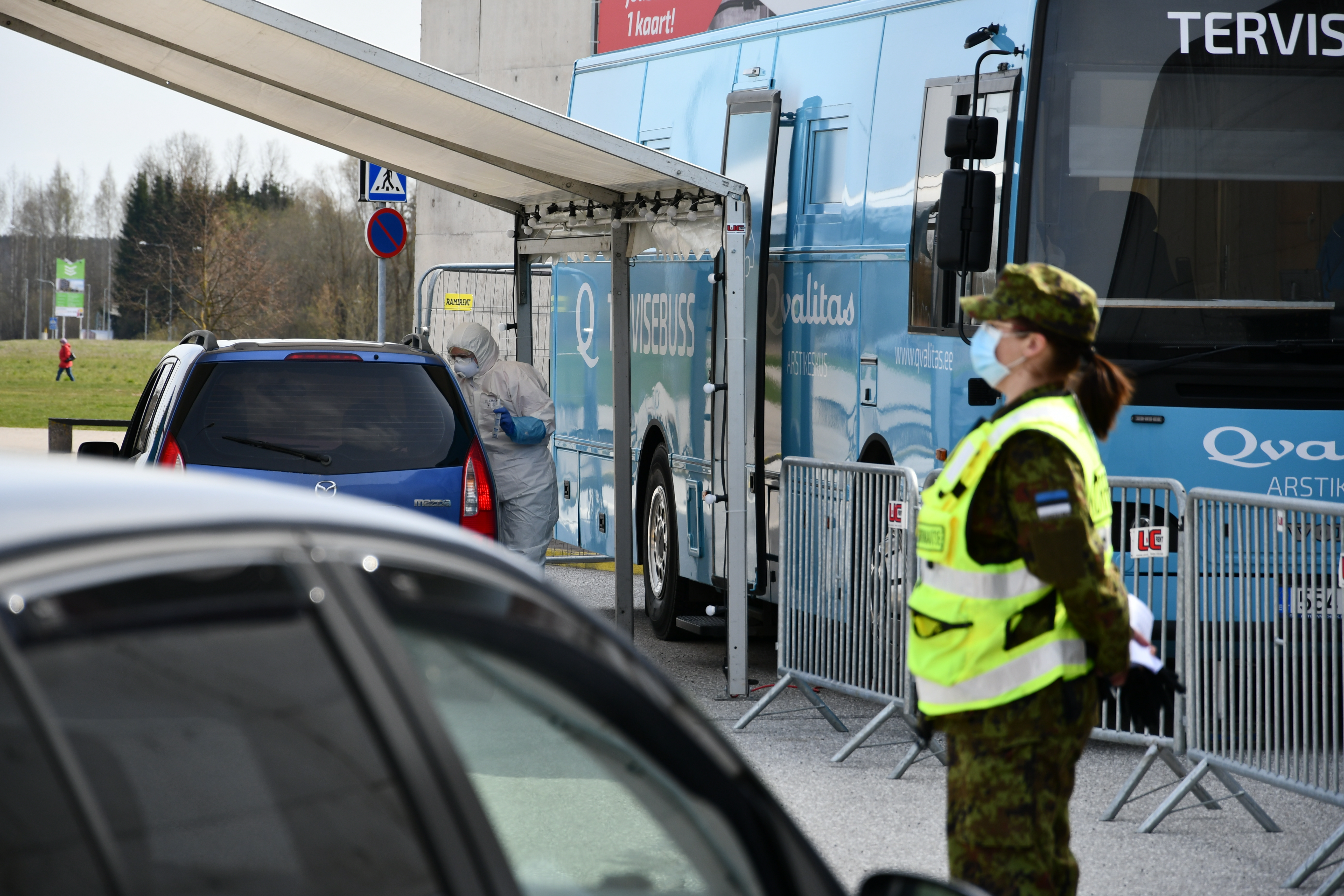 Esiplaanil korrakaitsja ja järjekorda ootav auto, tagaplaanil proovi võtmine sinise Mazda reisijalt.